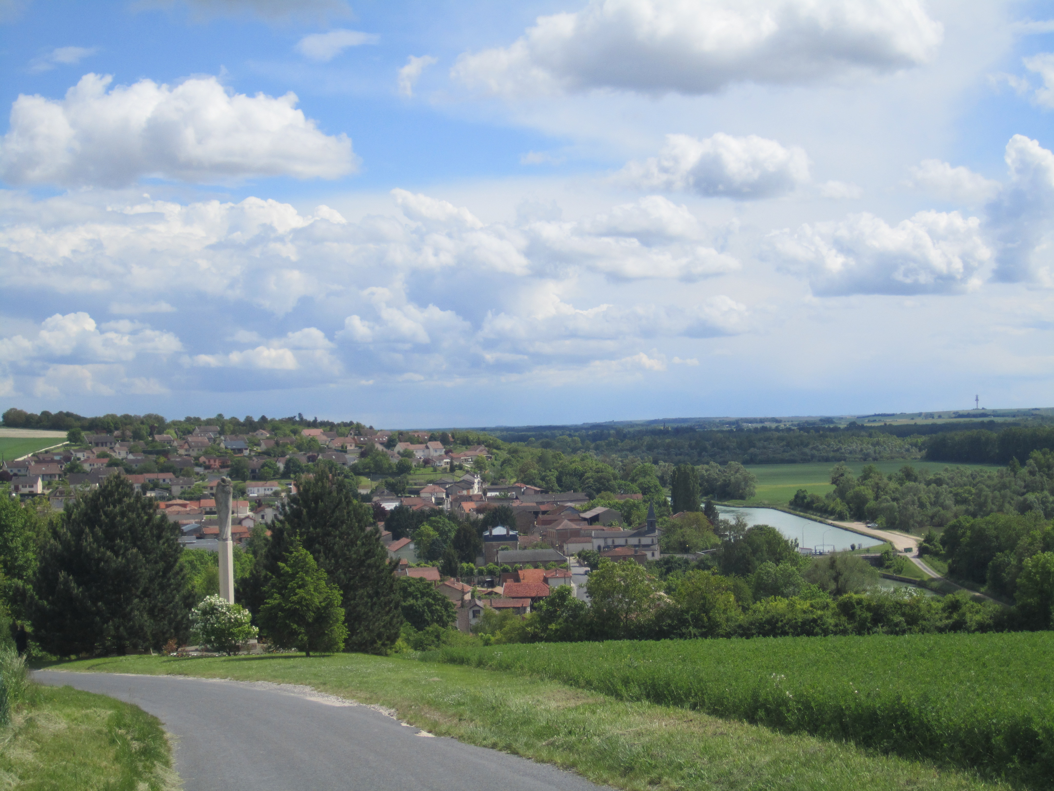 met het kanaal evenwijdig aan de Marne